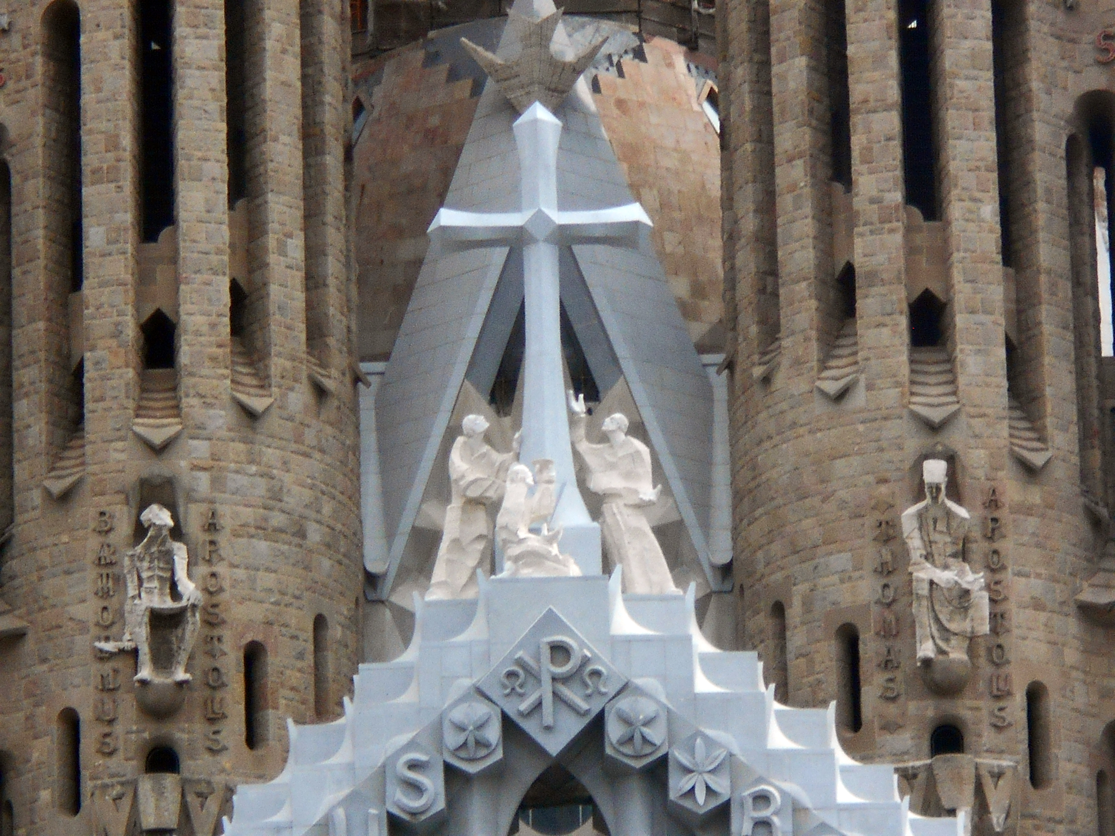 Cruz triunfal.